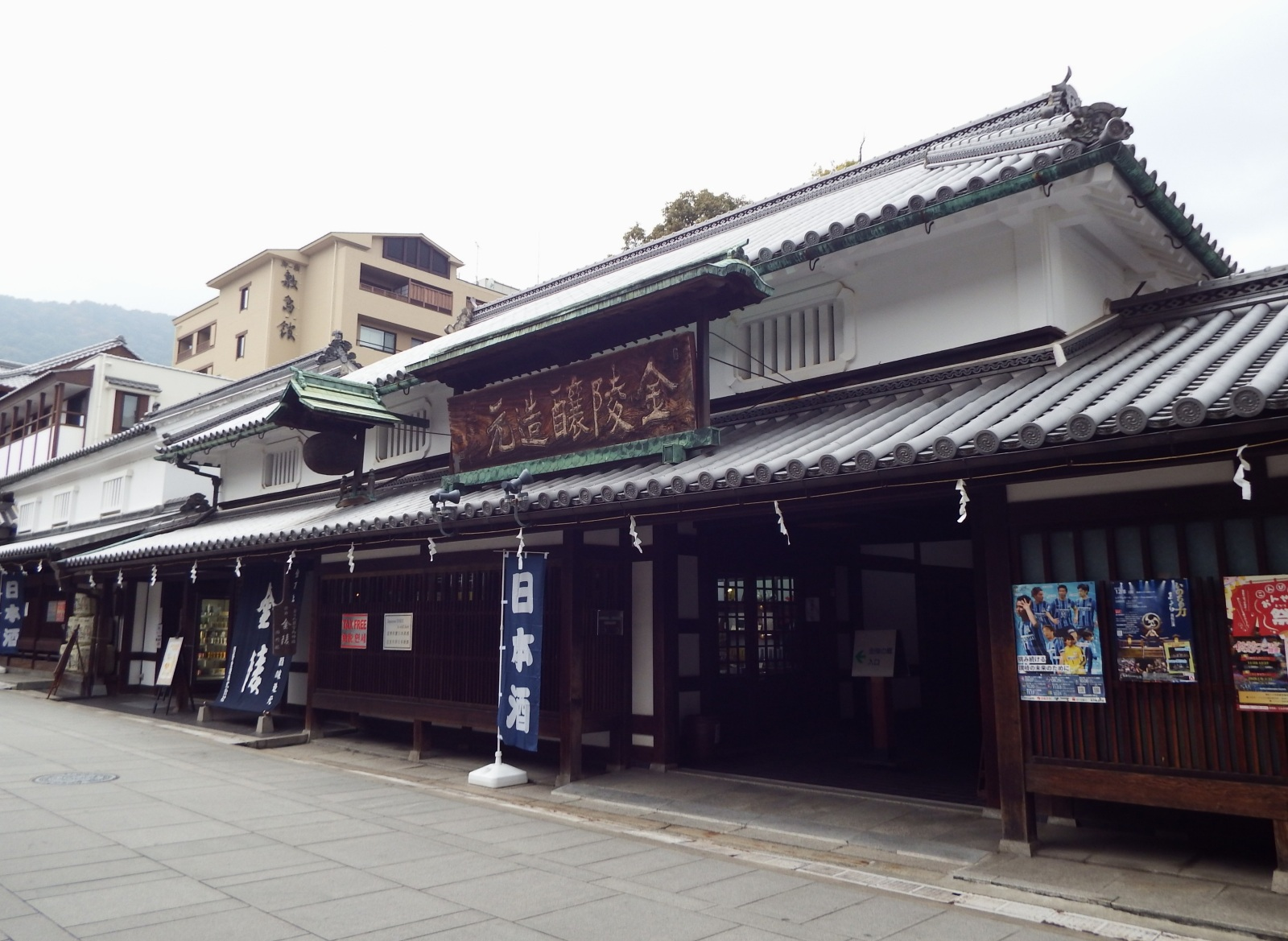 金陵の郷 琴平町